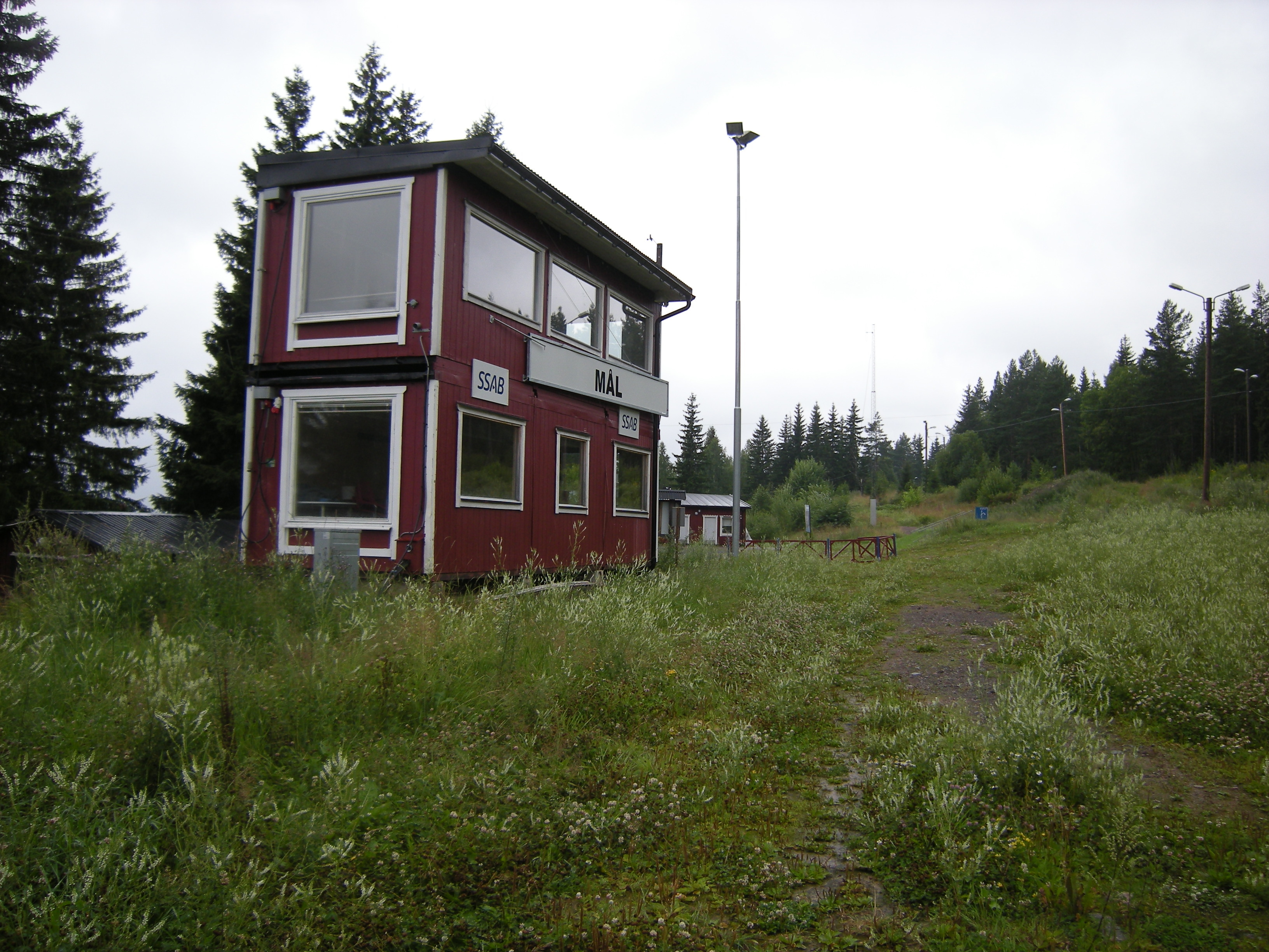 Borlänge, Domnarvets GoIF Bergebo målgång skidor.